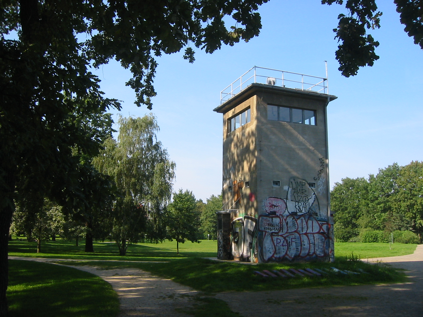 Park "Schlesischer Busch" in Berlin-Alt-Treptow an der Puschkinallee mit einem der drei noch erhaltenen Wachtürmen der Berliner Mauer